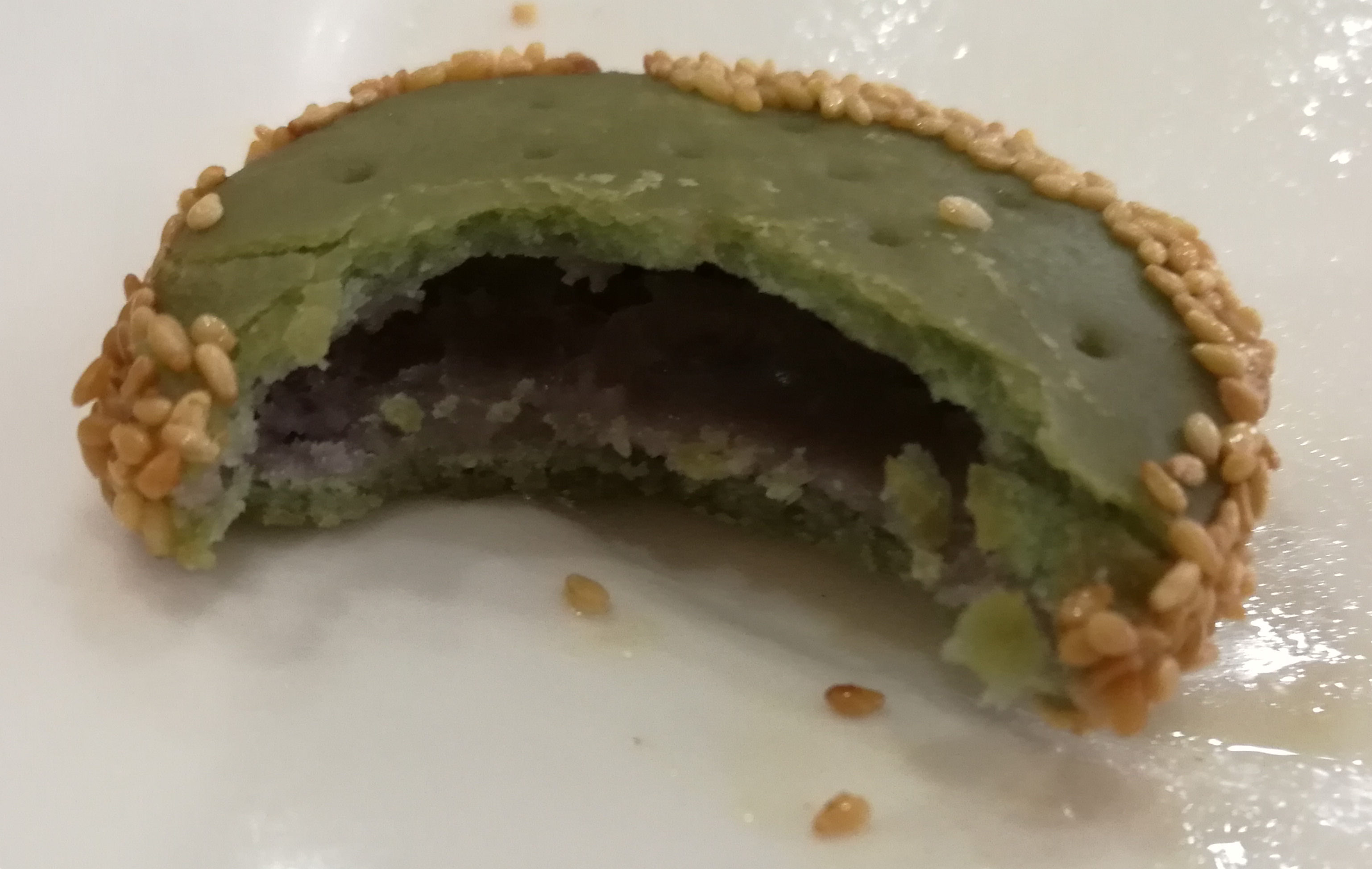 lucha fobing (绿茶佛饼) gâteau de tareau au thé vert et aux graines de sésame, une spécialité du Sud de la Chine.